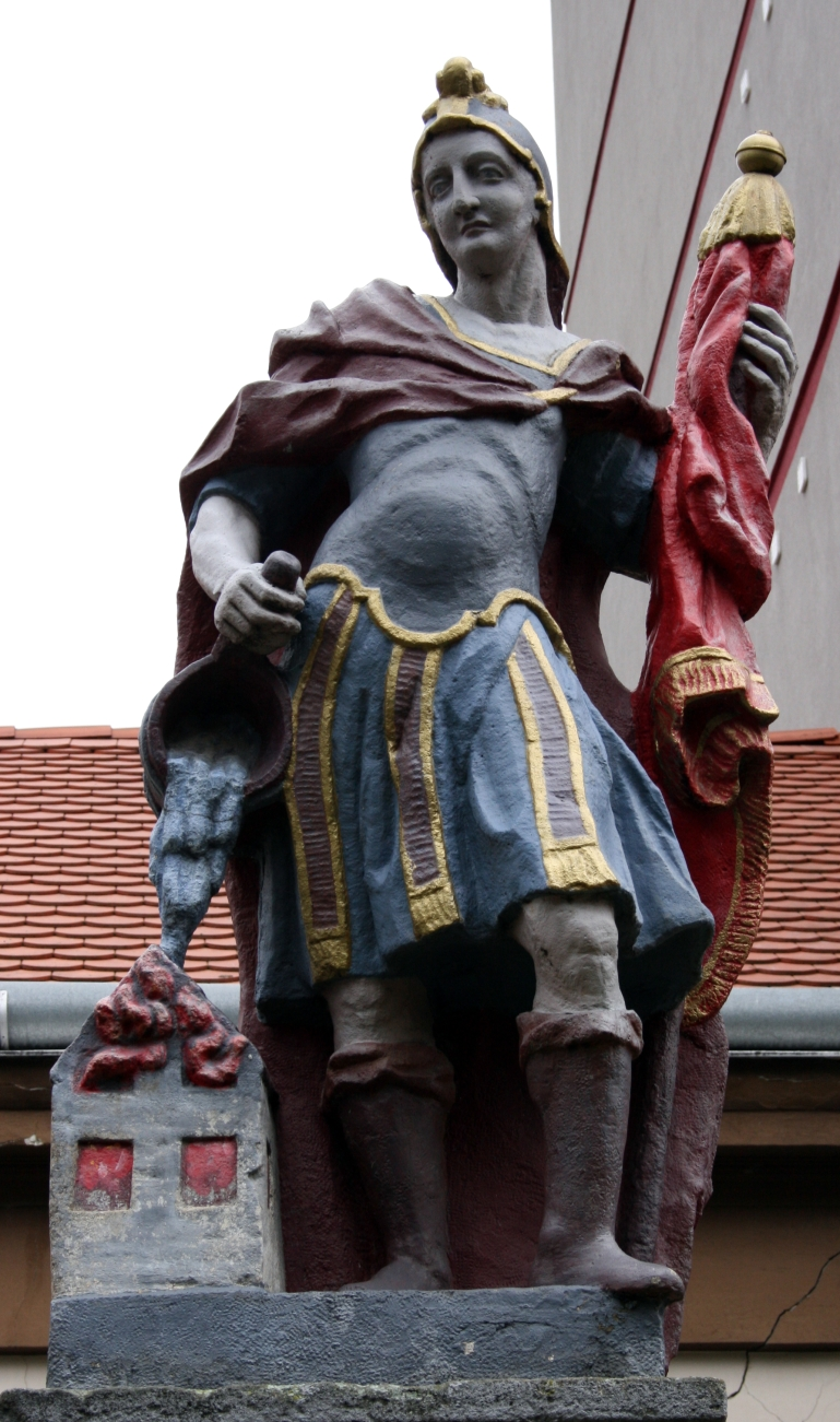 spomenik Svetom Florijanu iz 1771. godine u Osijeku, Hrvatska